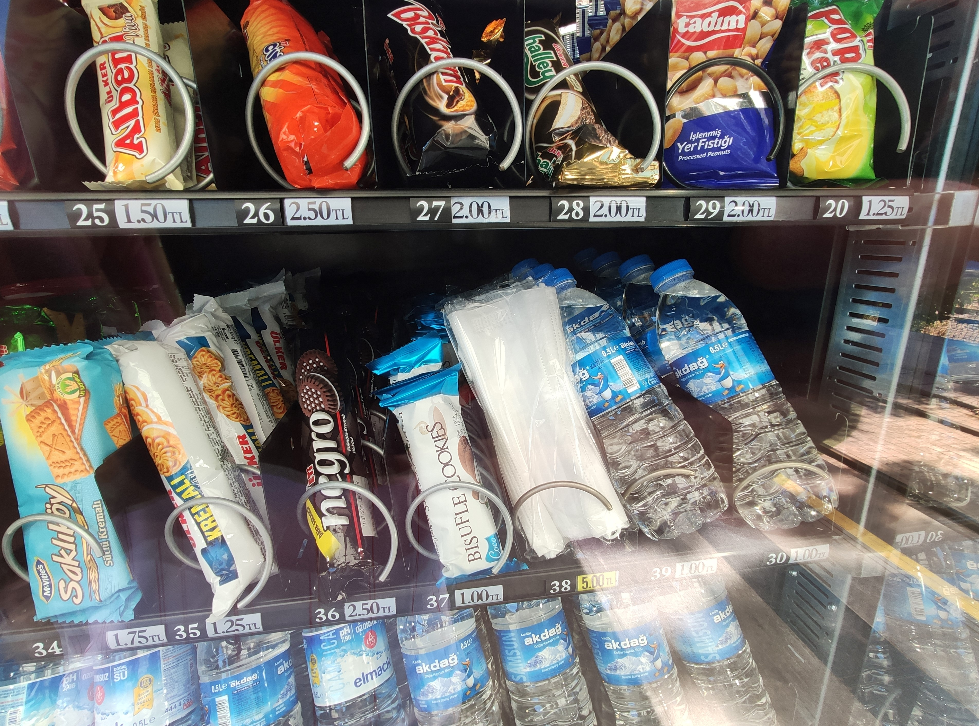 SAMRAY'ın Samsunspor durağındaki bir atıştırmalık otomatındaki cerrahi maskeler. 5 maskenin ₺5 fiyatla satıldığı görülüyor.